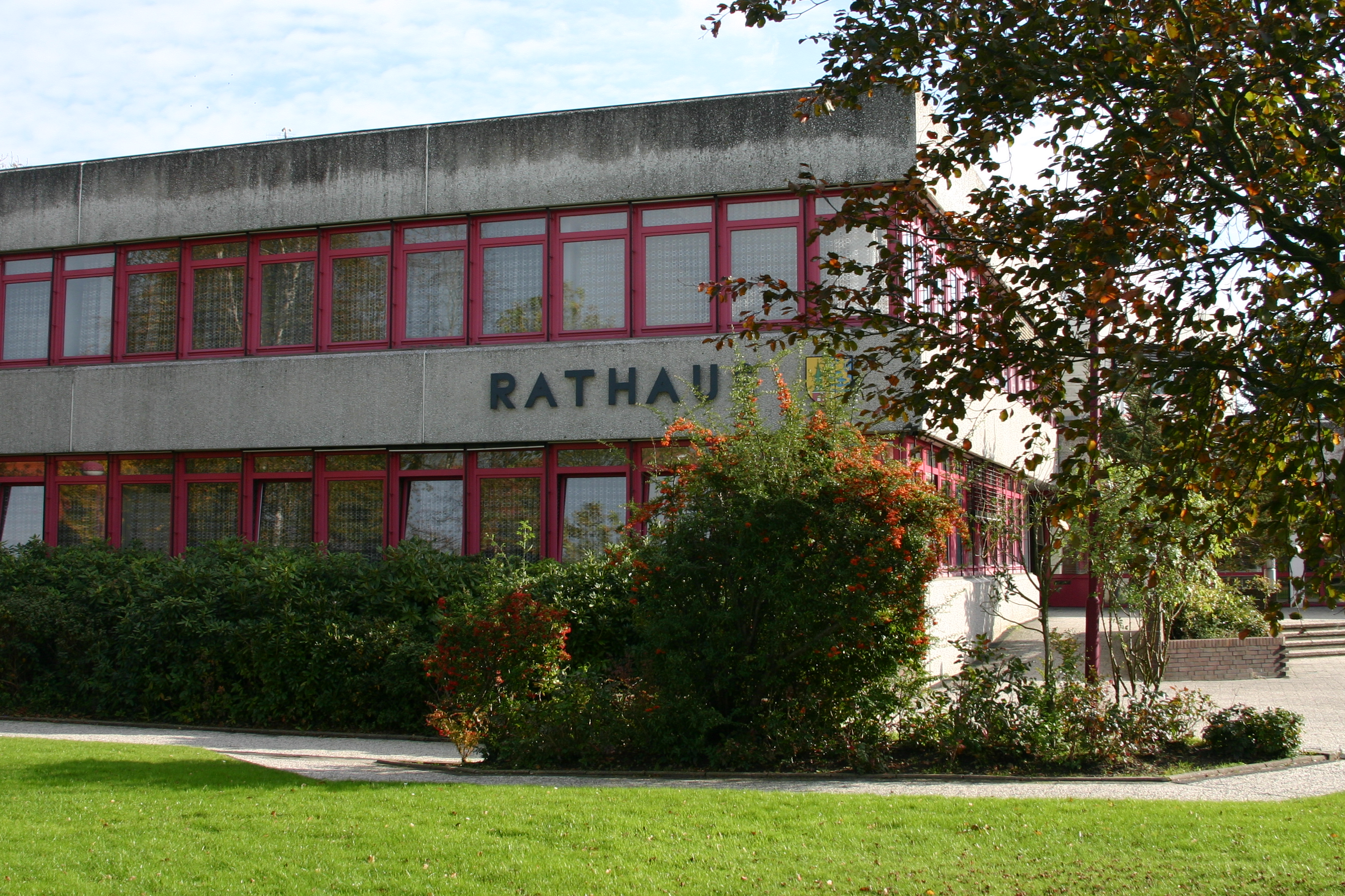 Rathaus von Sande (Friesland)